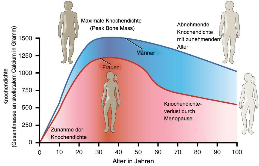 Diagramm der Knochendichteentwicklung